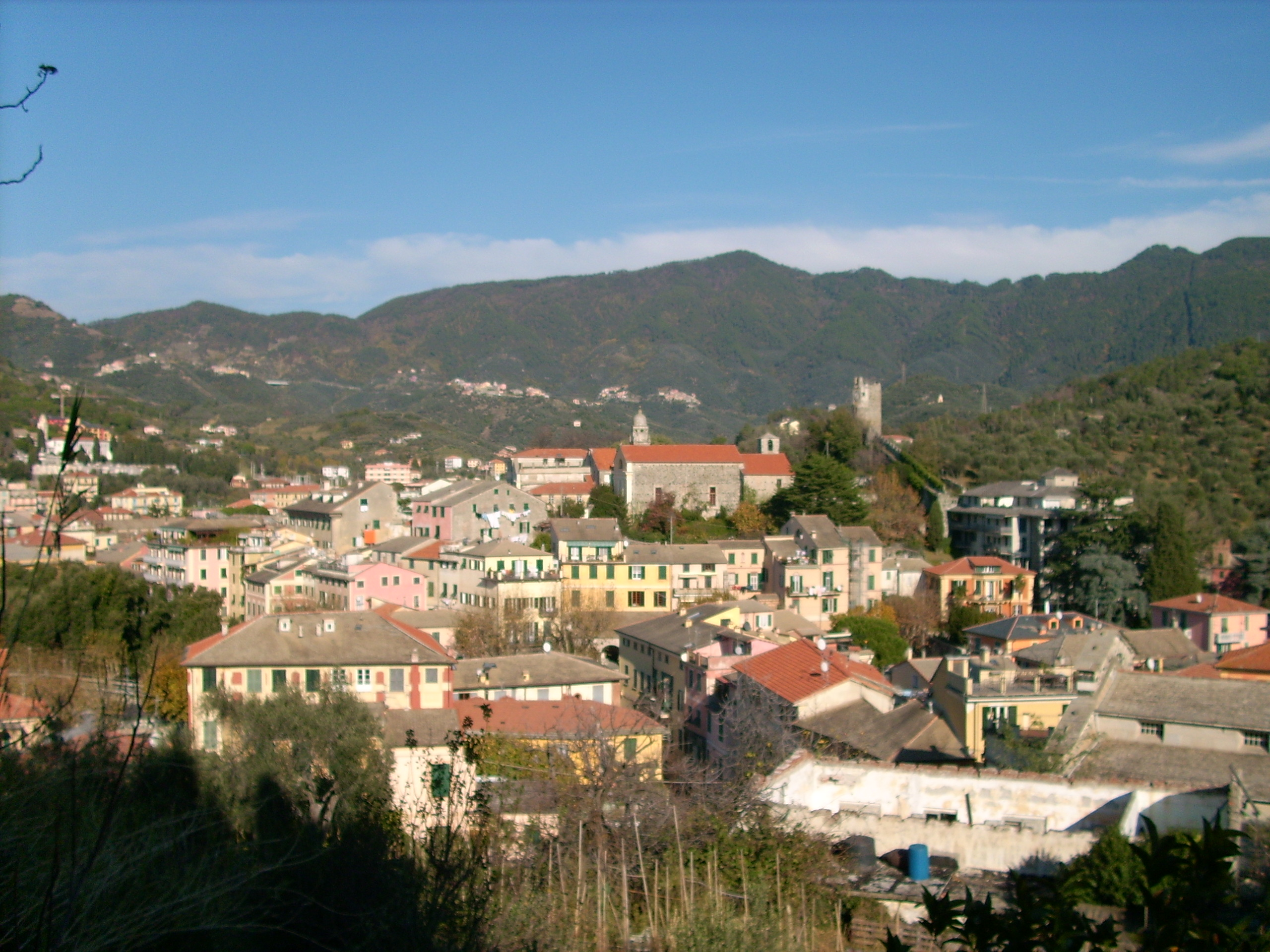 Levanto, Liguria, Italia